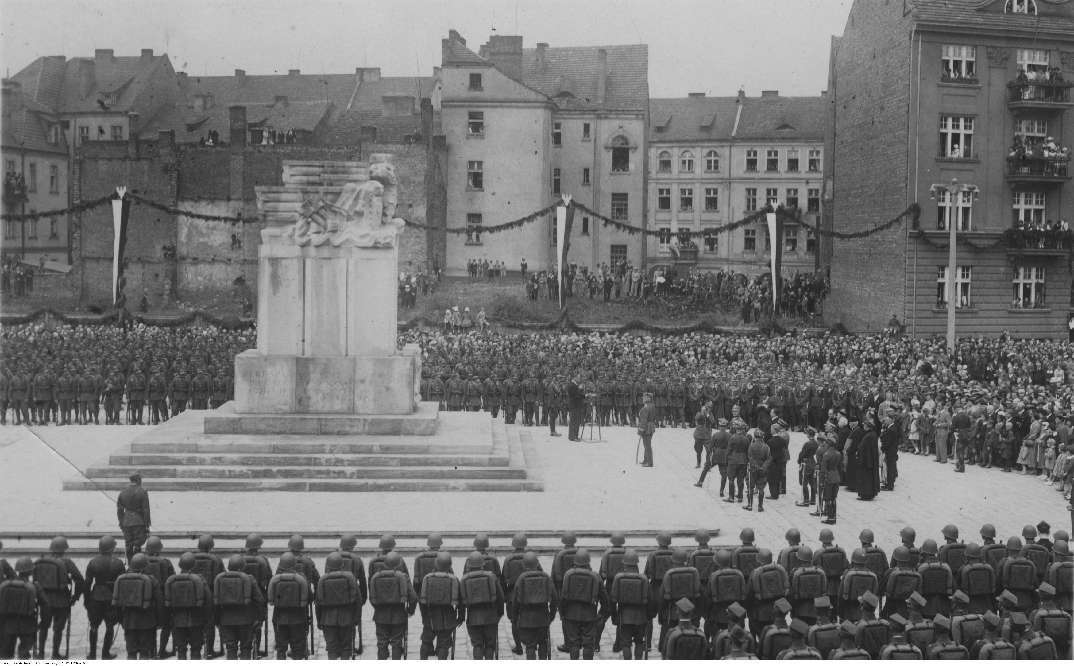 Święto 29 Pułku Strzelców Kaniowskich w Kaliszu; czerwiec 1936. Widok ogólny uroczystości odsłonięcia pomnika poległych żołnierzy pułku. Koncern Ilustrowany Kurier Codzienny - Archiwum Ilustracji. Sygnatura: 1-W-1206a-6